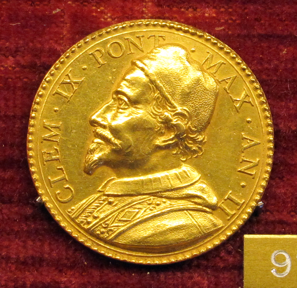 Medaglie romane '600-'700